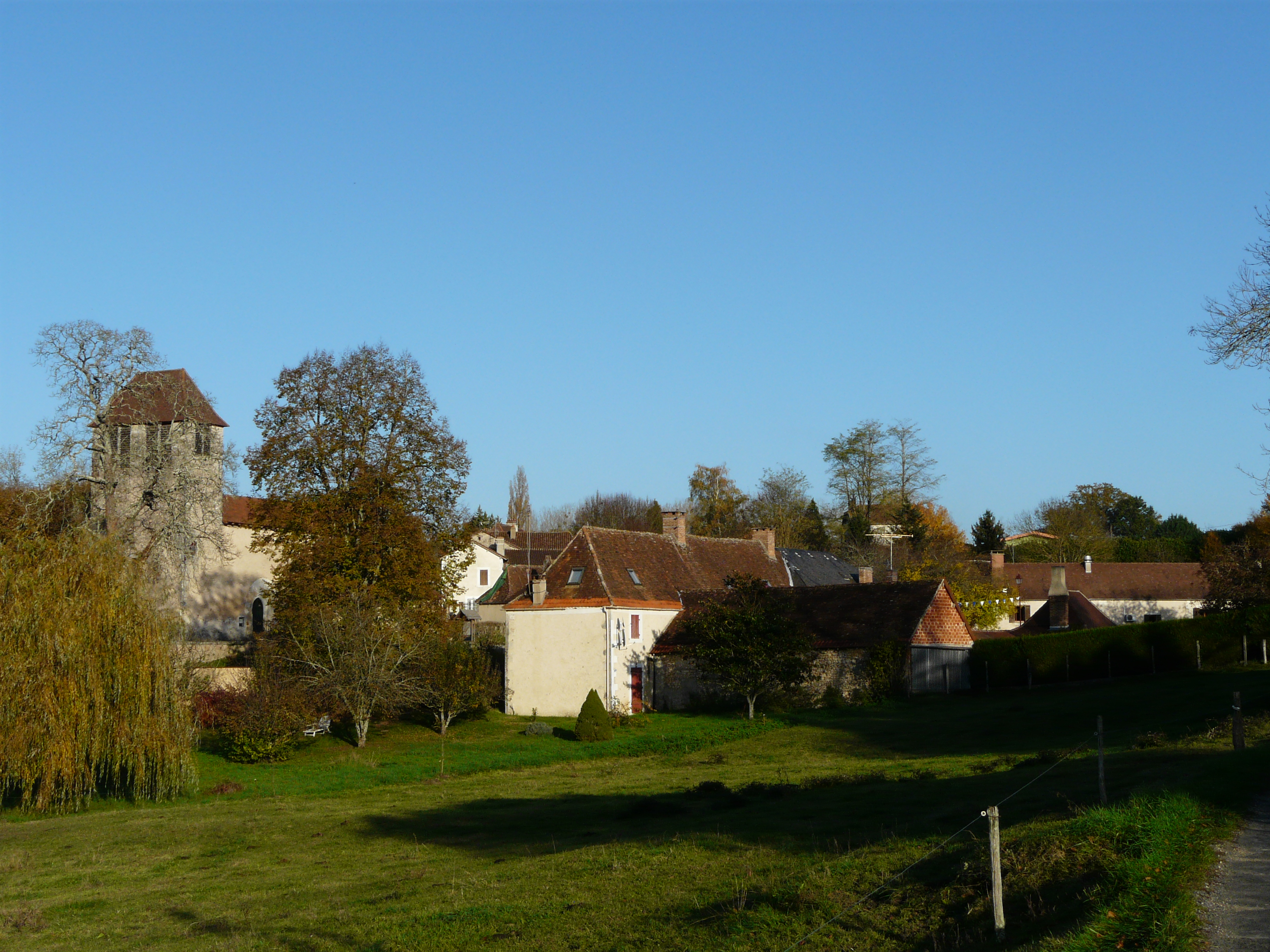 Le village de Milhac-d'Auberoche, Dordogne, France.